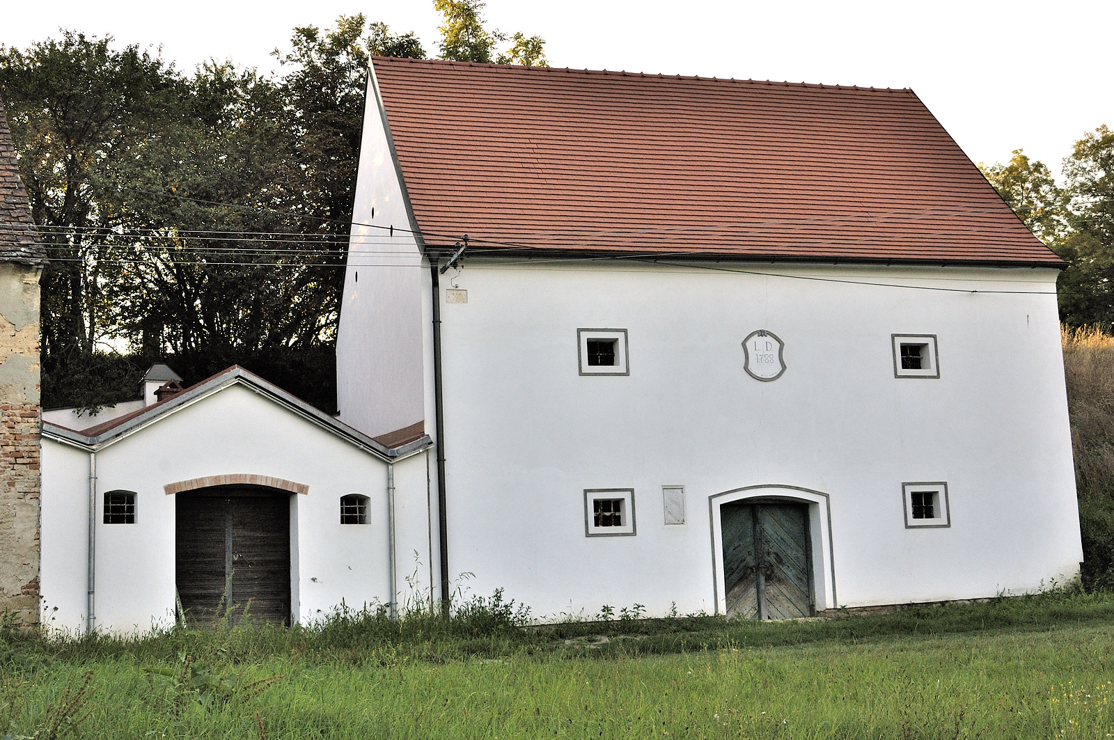 Presshäuser